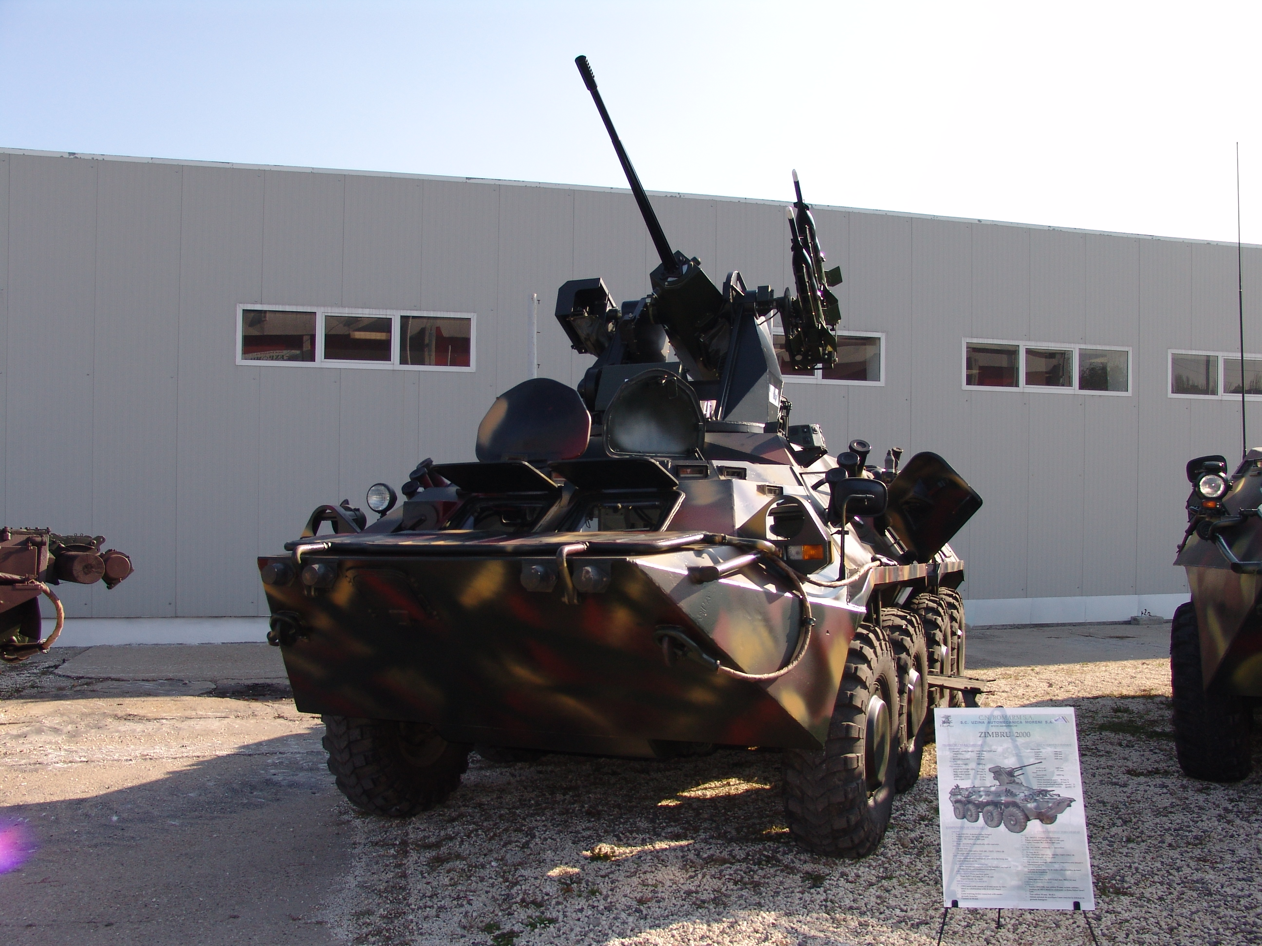 Zimbru 2000 prototype on display at Expomil '05.